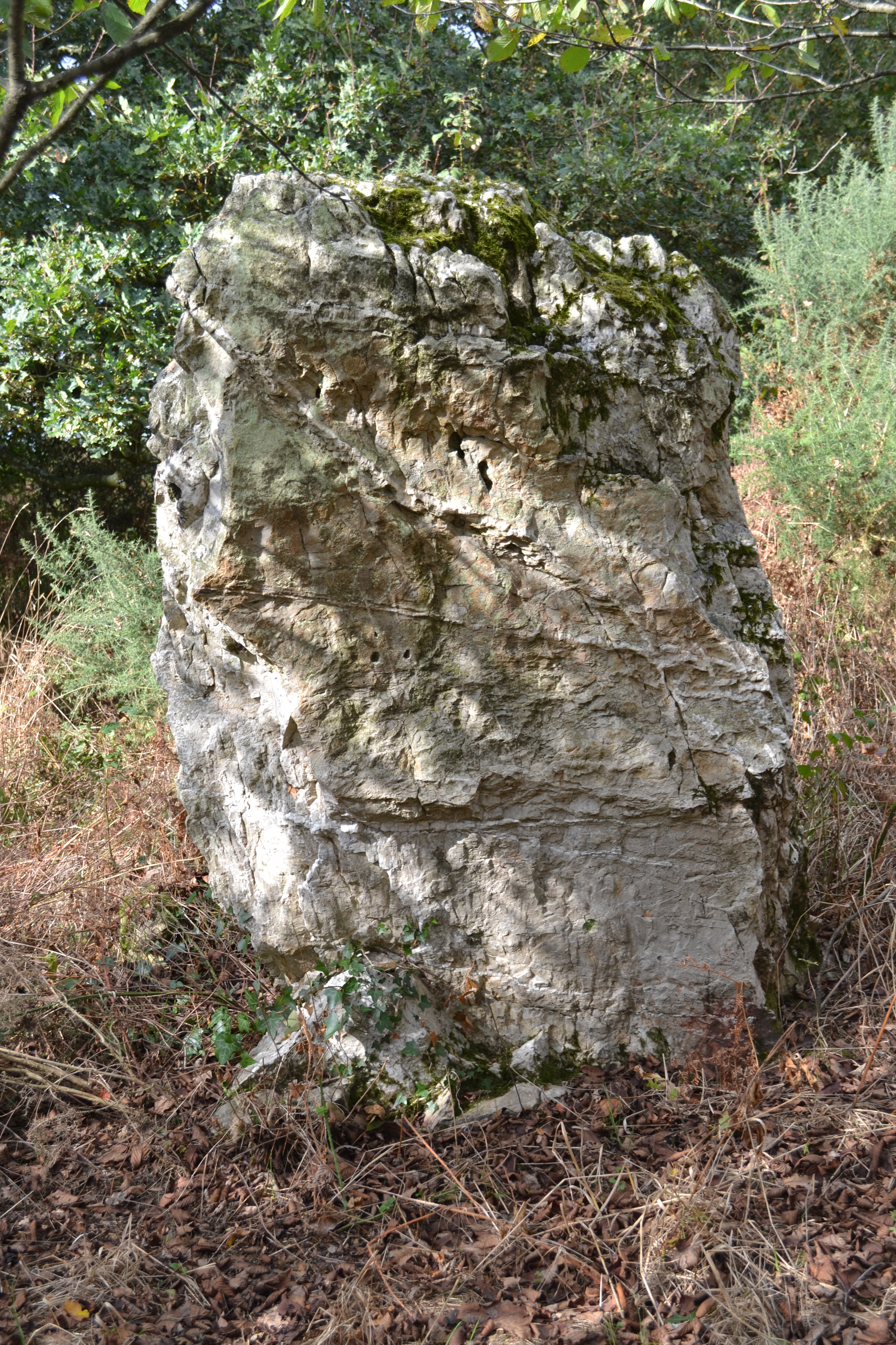 Menhir des Cohardais, Lusanger.